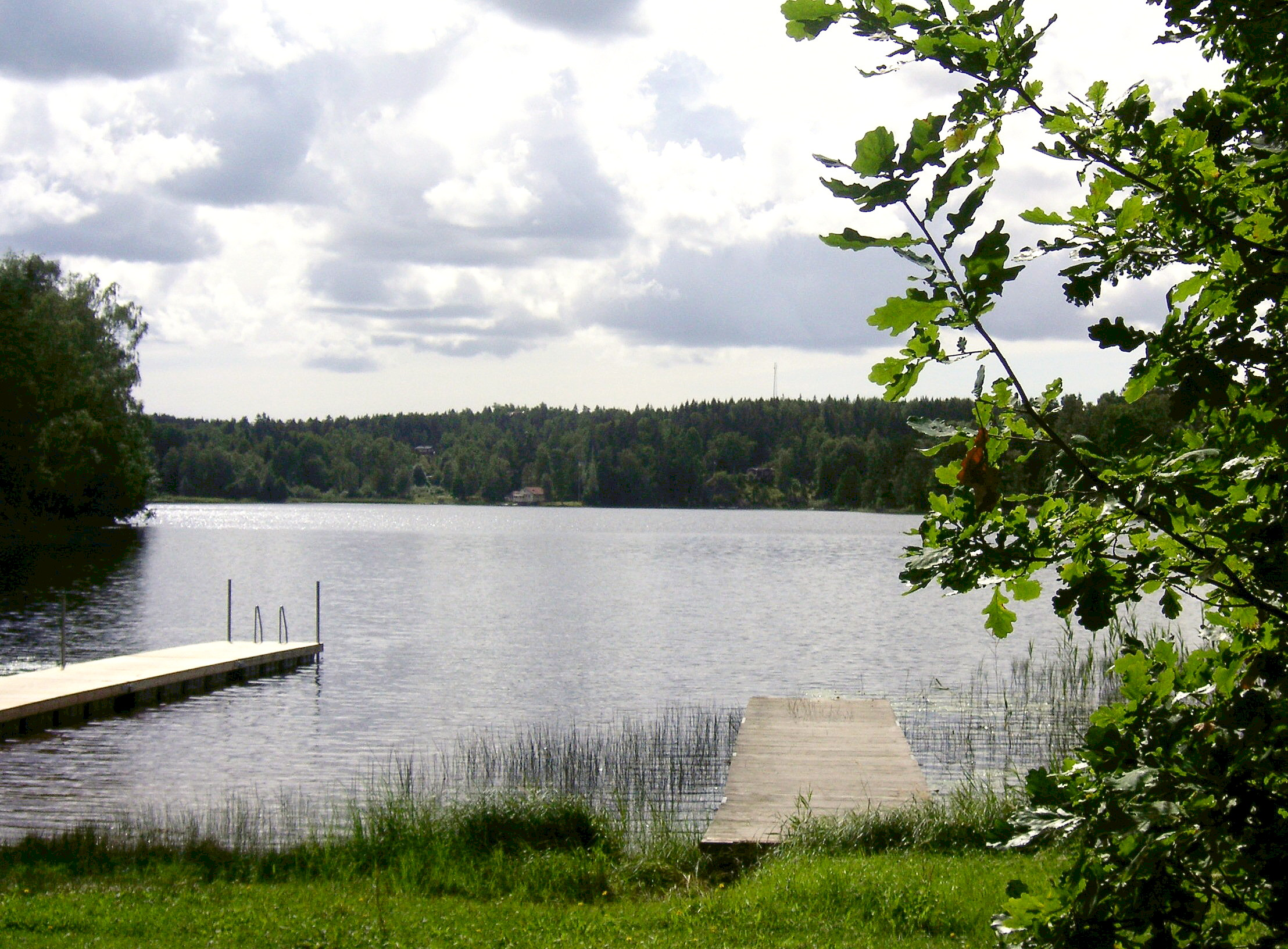 Sjön Ådran i Huddinge kommun